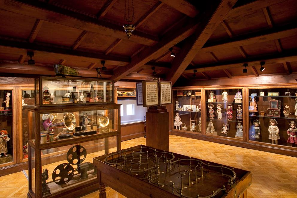 Sala de les diversions. Gabinet del col·leccionista del Museu Frederic Marès